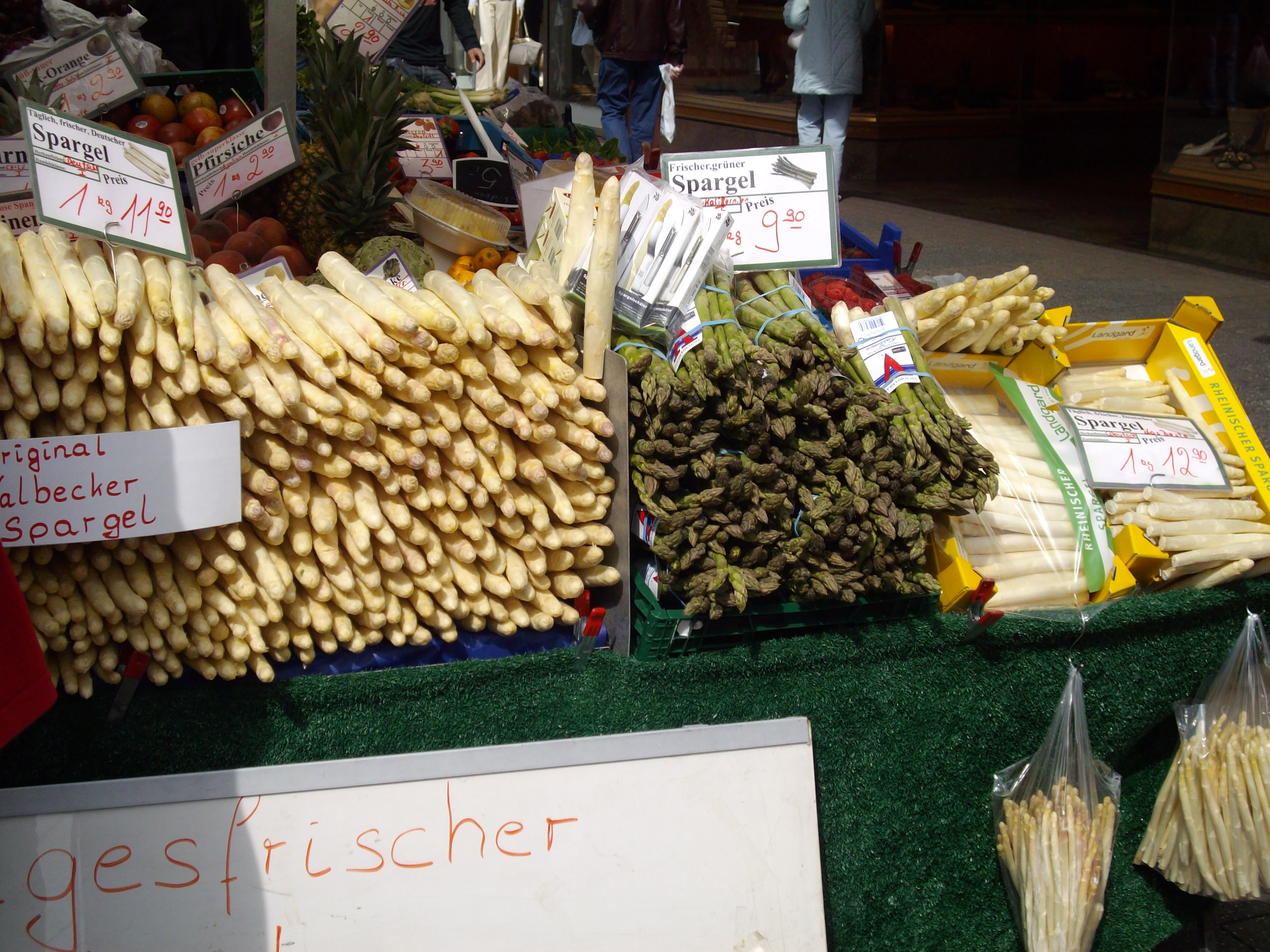 Cologne marketinde bir kuşkonmaz standı.